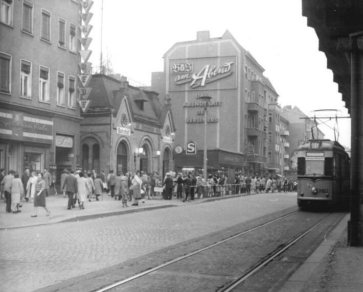 ADN-ZB-Franke Sd-Schm 26.4.1961 Berlin: Am S-Bahnhof Schönhauser Allee.